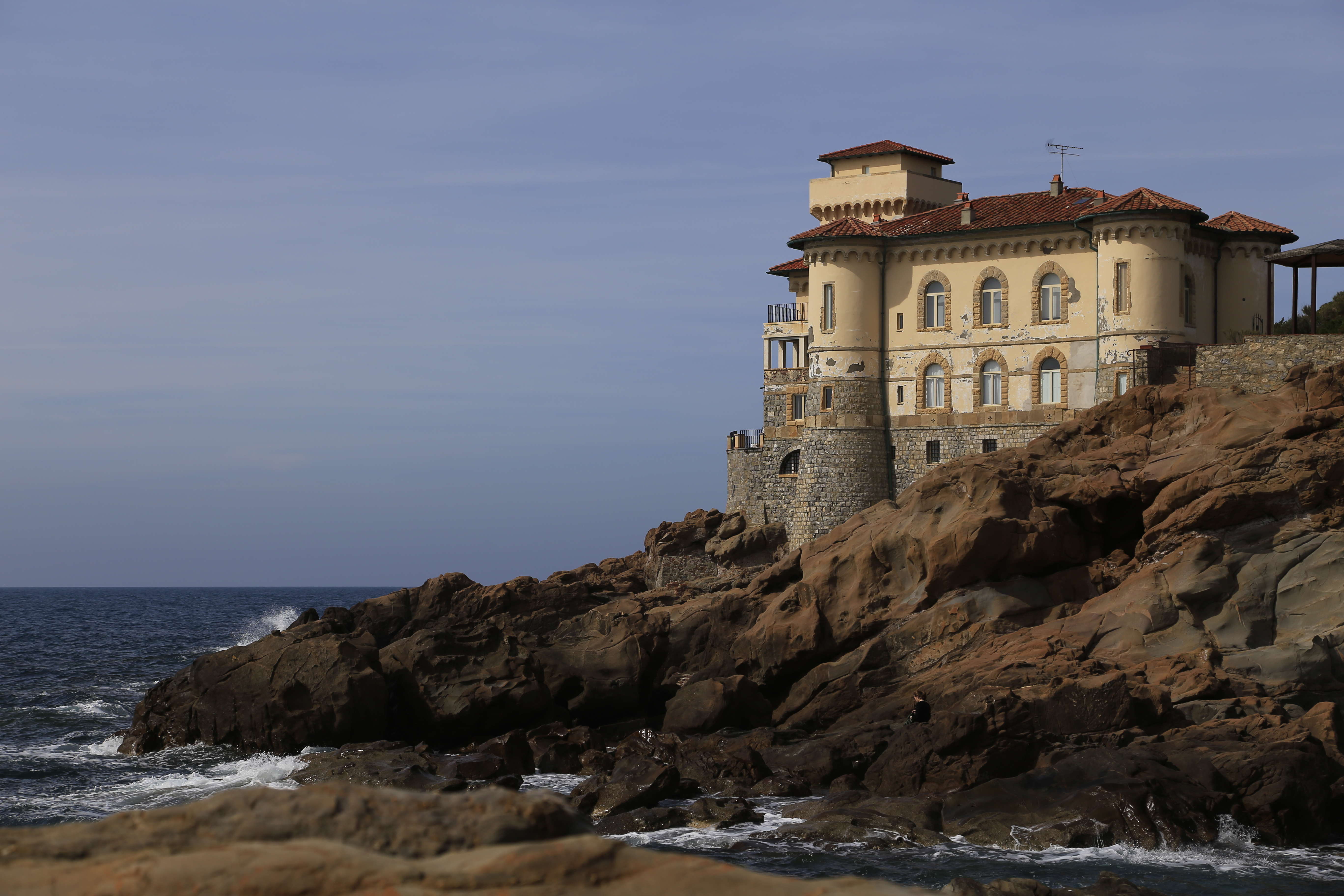 Castel Boccale